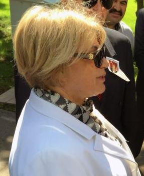 Süleyman Demirel Funeral